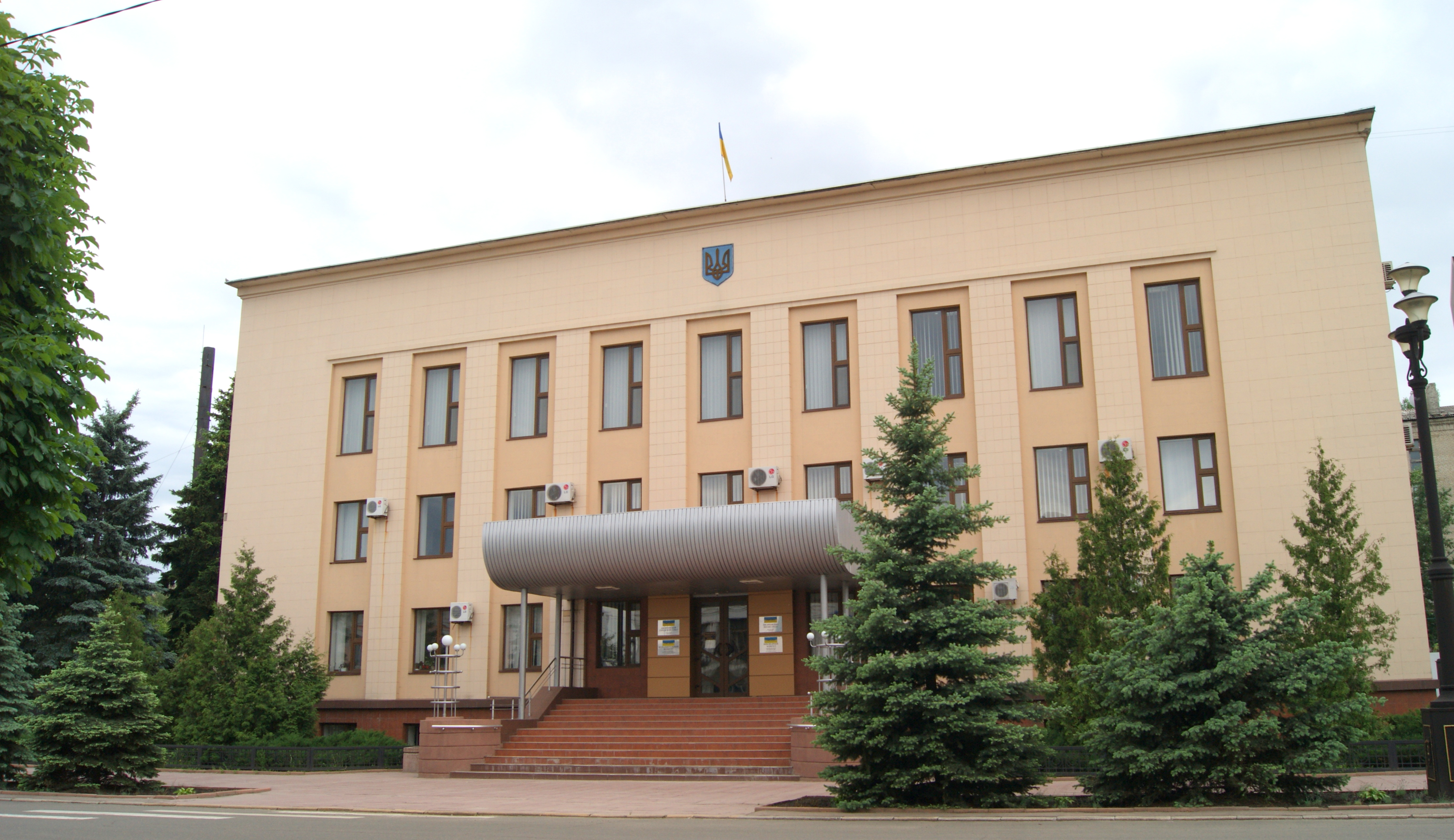 вул. ім. М. Грушевського, 7